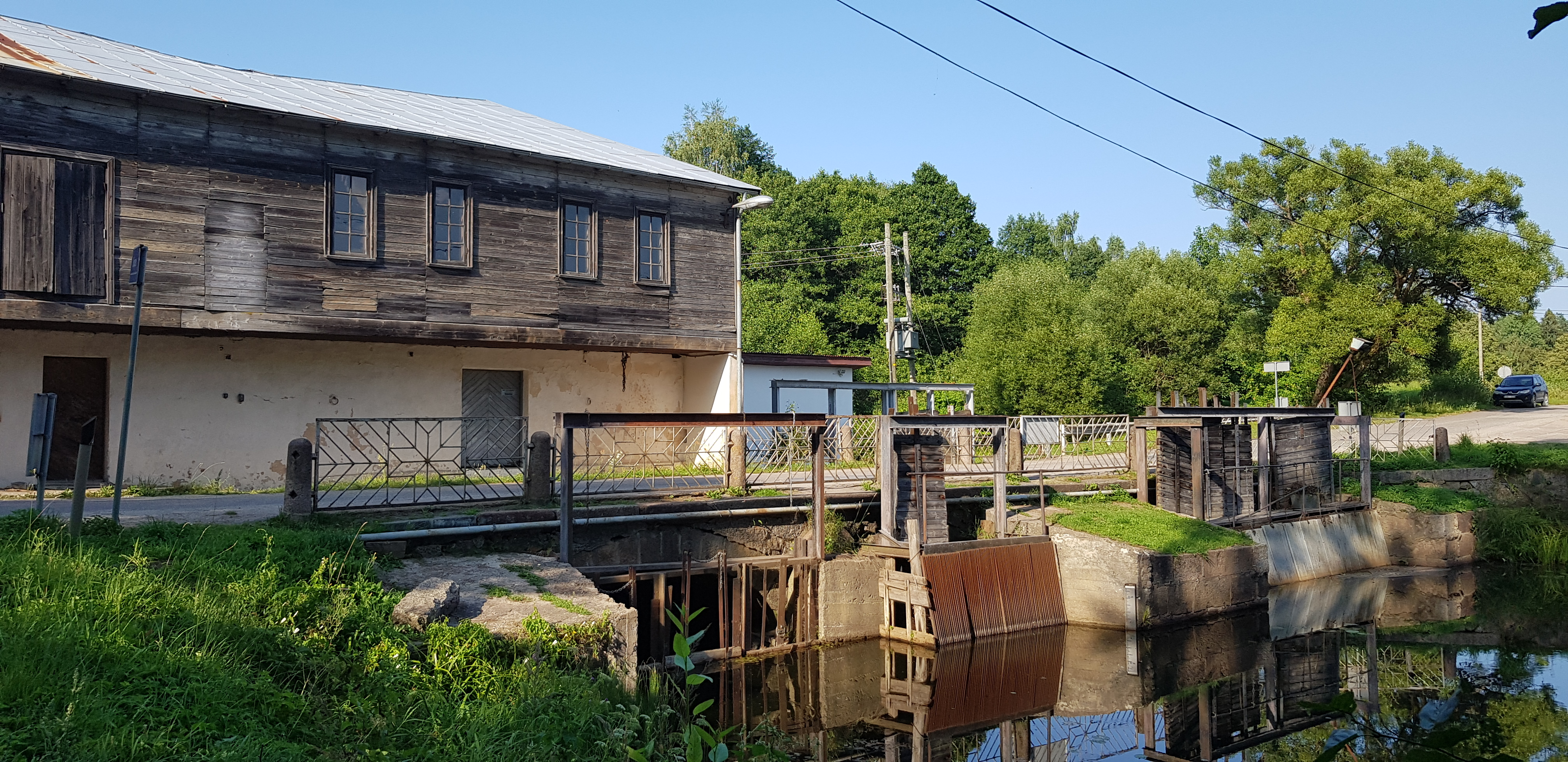 HES "Gravas" Ugāles dzirnavās